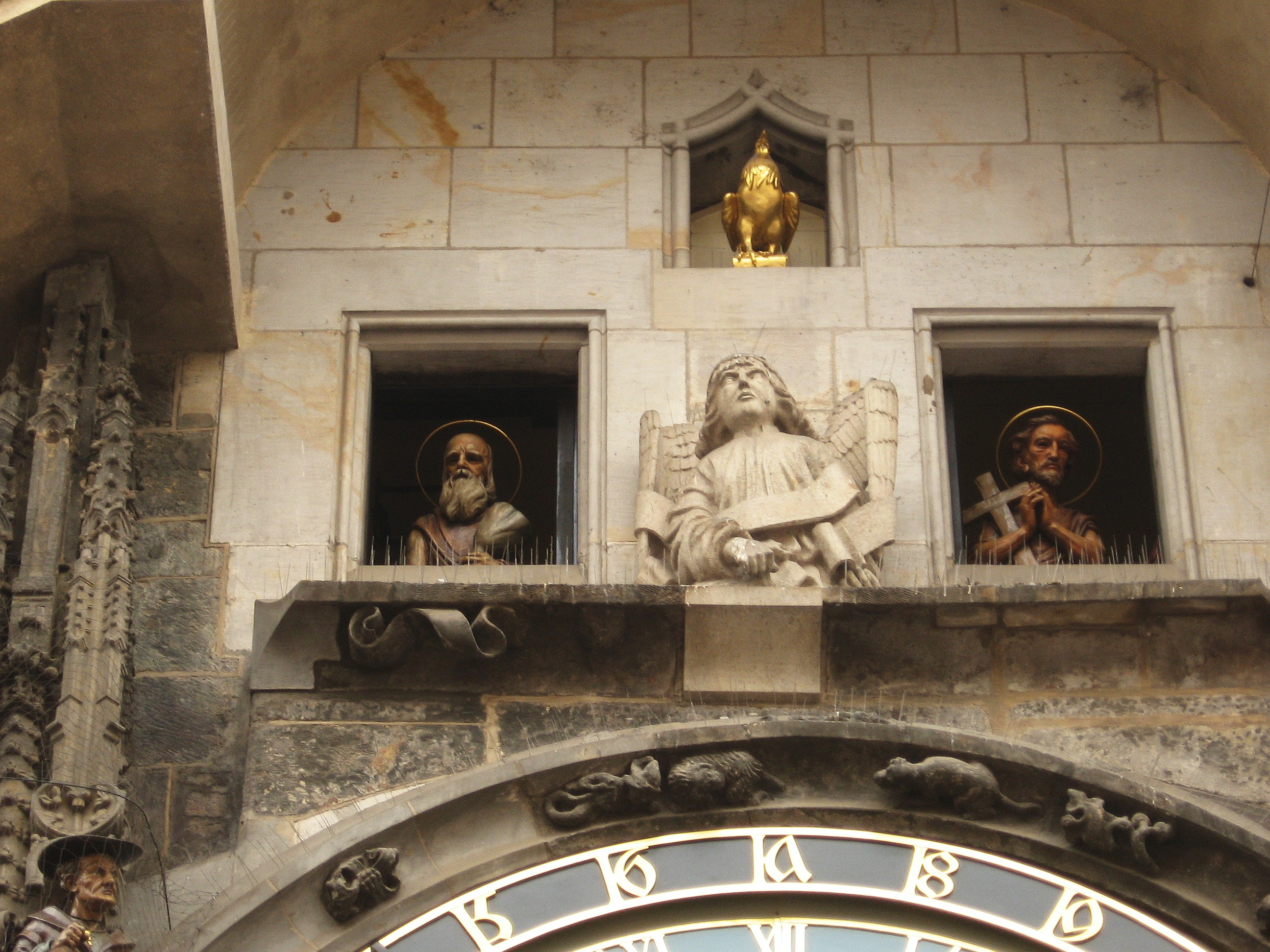 Pražský orloj. Pohyblivé sochy apoštolů. Třetí dvojice: Juda Tadeáš a Filip